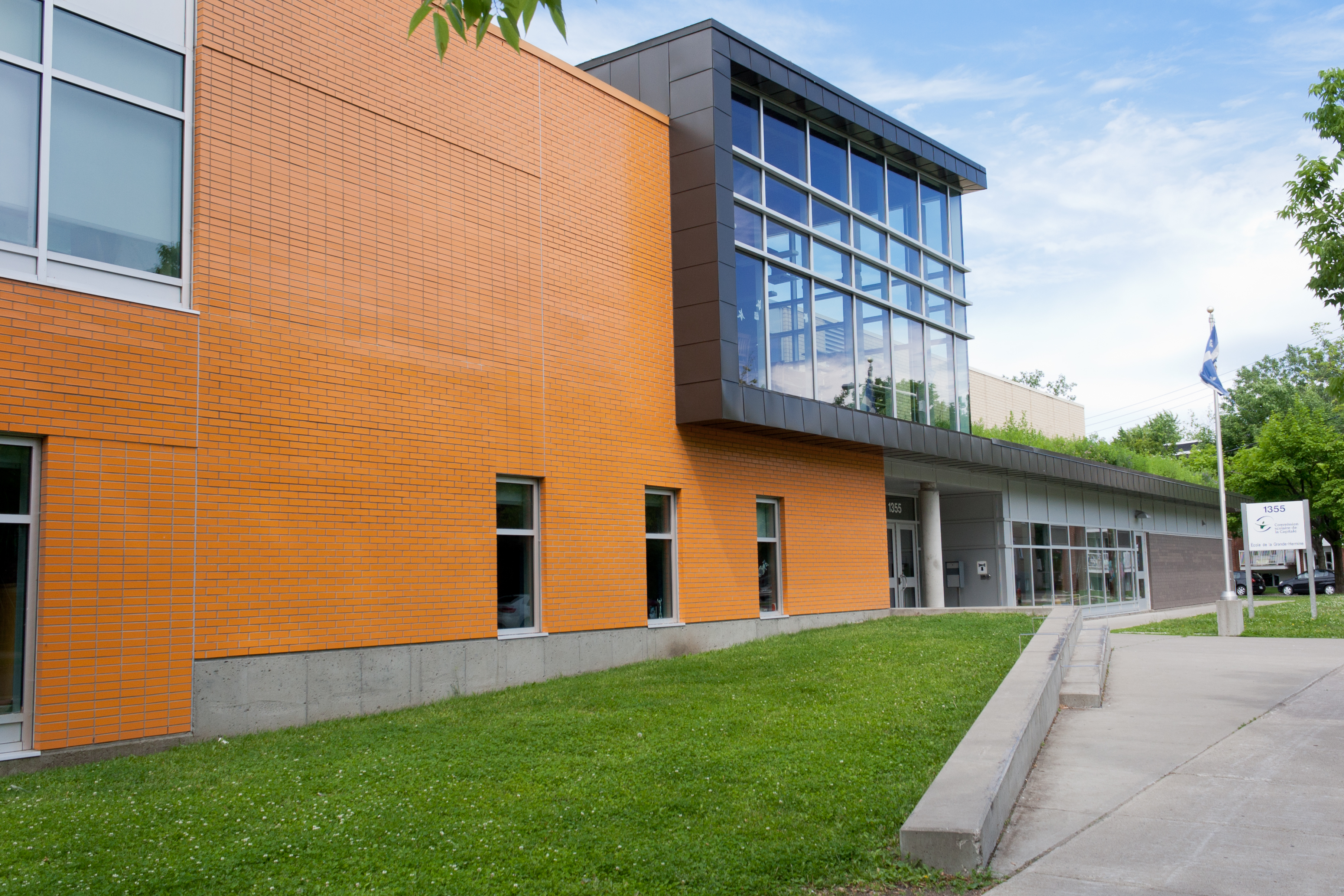 École primaire de la Grande-Hermine, à l'intersection de la 2e avenue et de la 13e rue, dans le quartier Limoilou de la ville de Québec. Cette école de la Commission scolaire de la Capitale a été construite en 2008. Elle est la première école primaire québécoise à recevoir la certification LEED-NC.